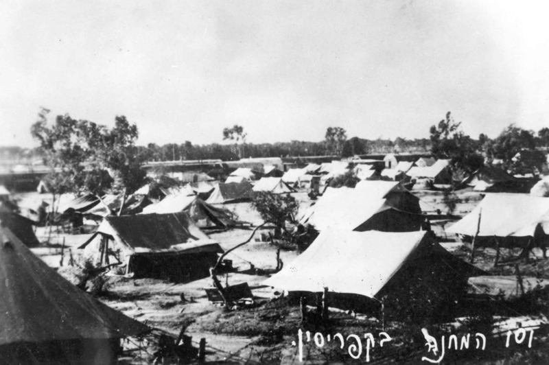 מחנה מעצר בקפריסין 1946 ארכיון ההגנה